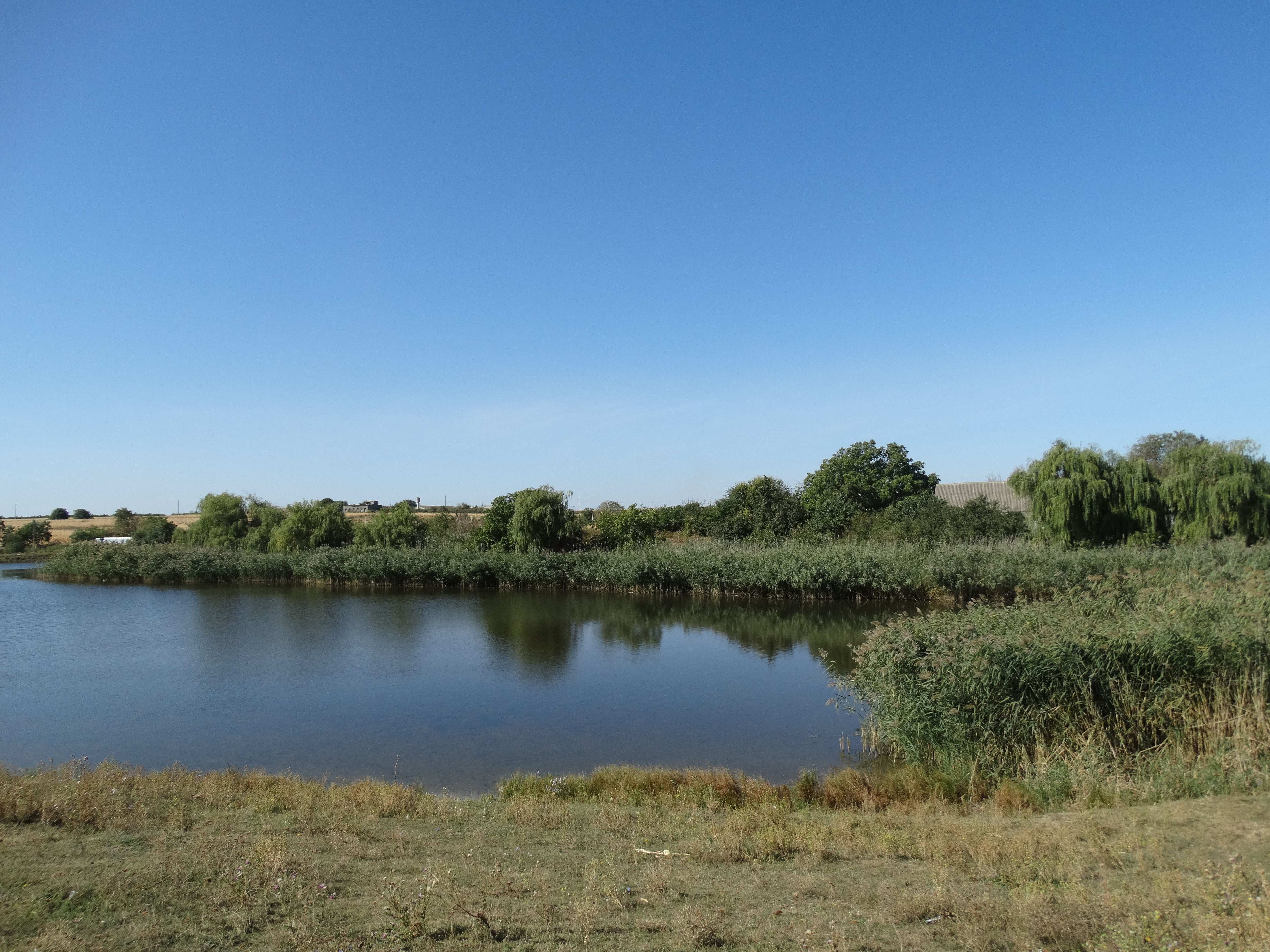 Став на річці Вижна в селі Новосамарка. Вікіекспедиція на північ Одещини